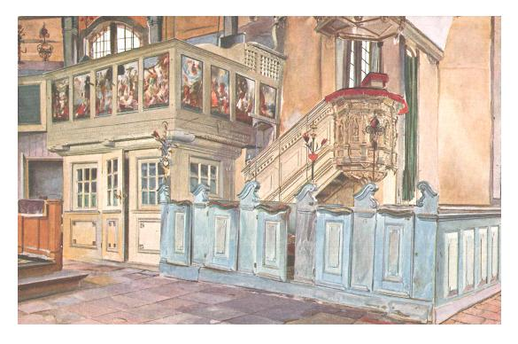 Hamburg - Curslack St. Johannis-Kirche innen am Anfang des 20. Jahrhunderts